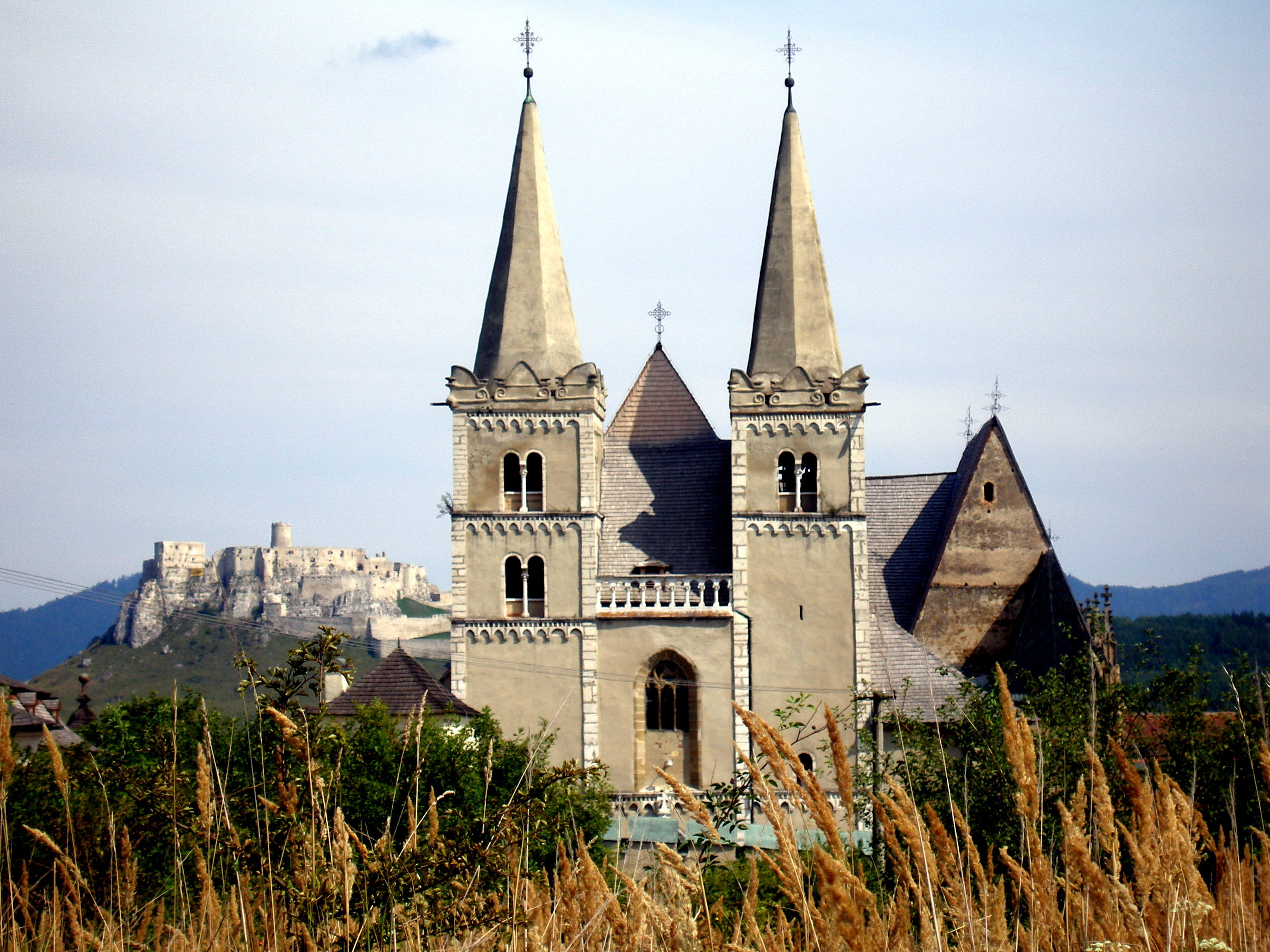 Spišská Kapitula a Spišský hrad, región Spiš